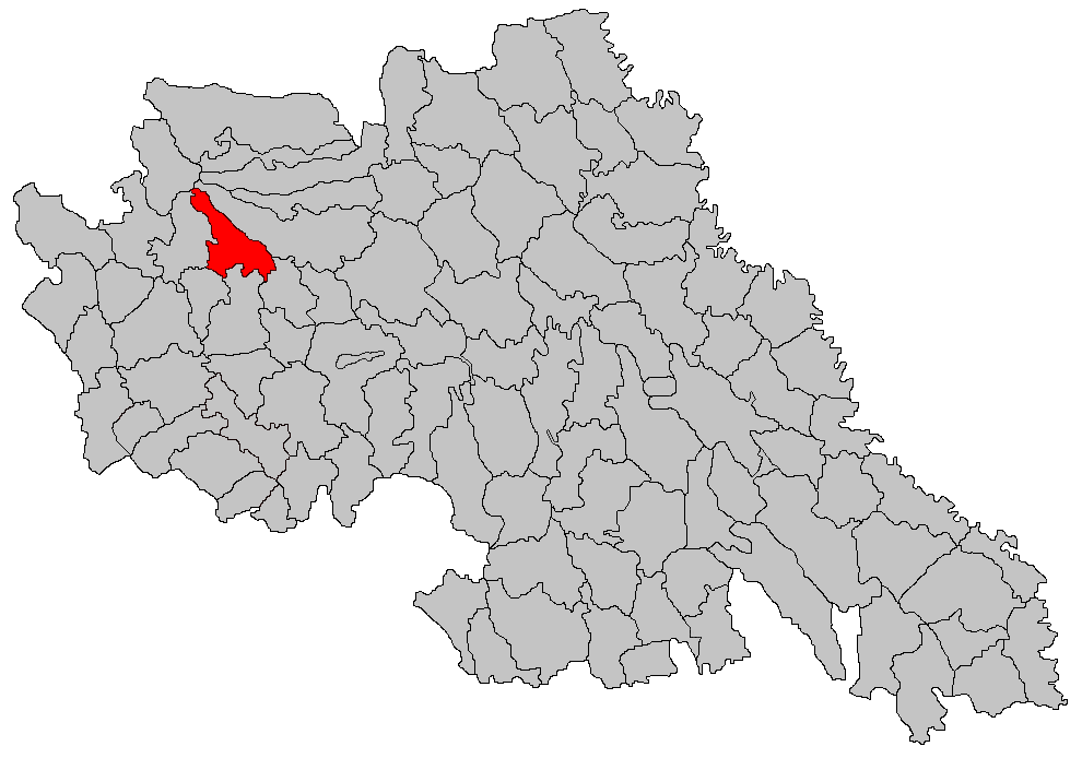 Categorie:Hărţi ale judeţului Iaşi